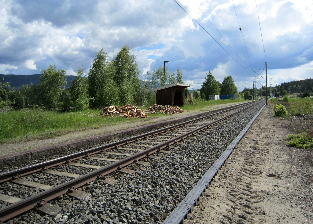 Drolsum stasjon på Randsfjordbanen